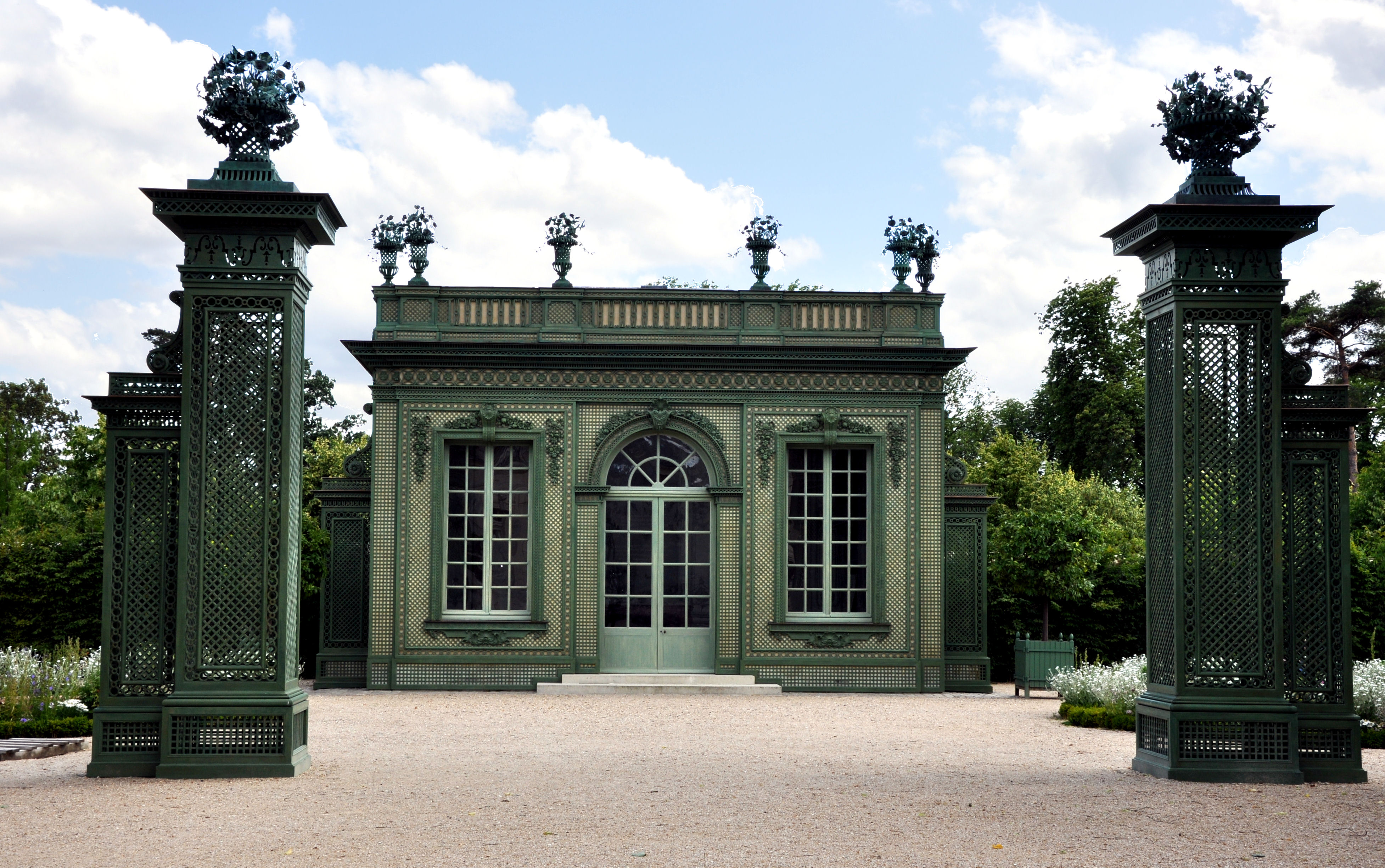 Le pavillon frais, au Petit Trianon de Versailles